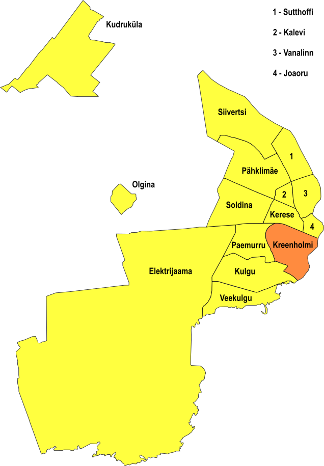 Narva linnaosa Kreenholmi